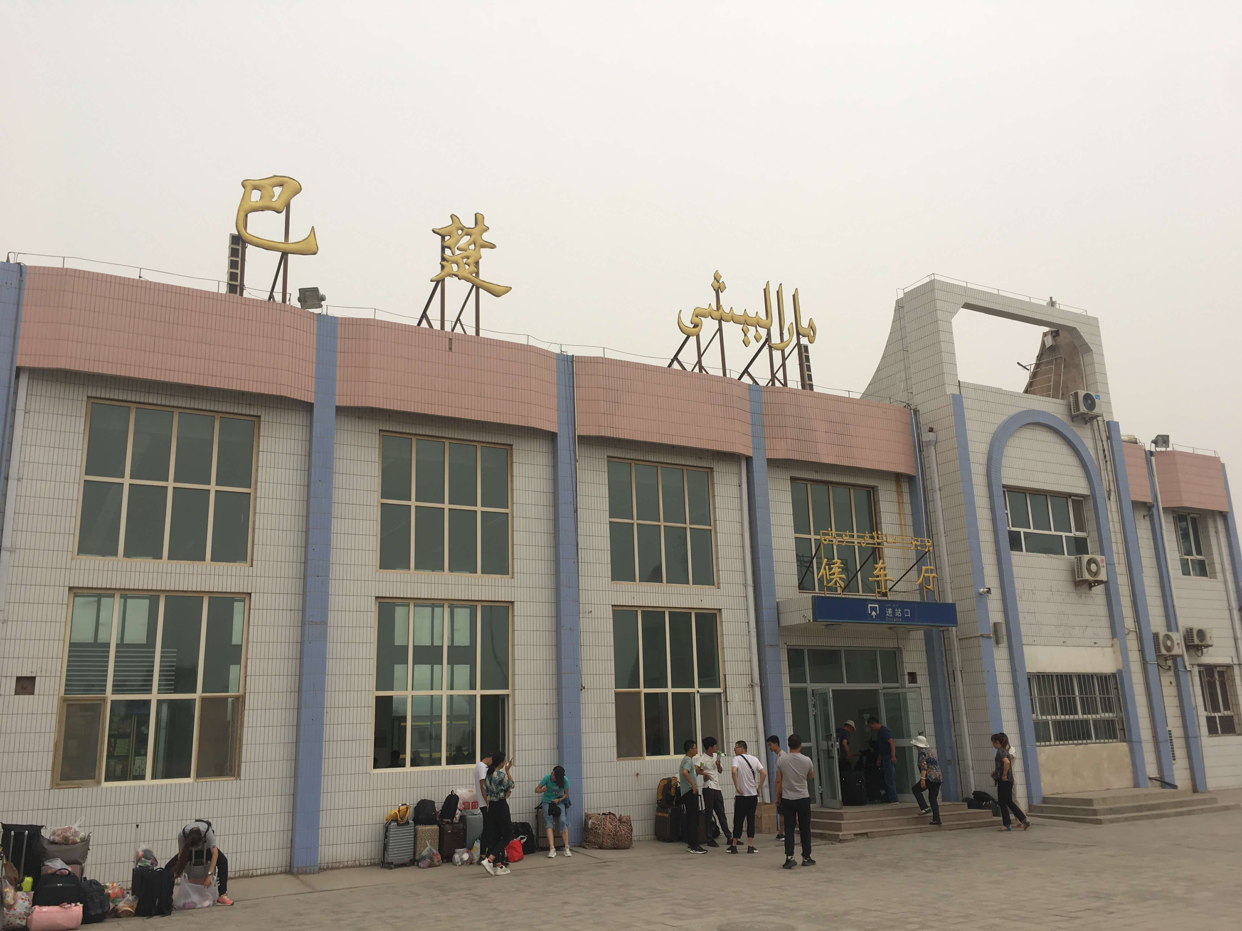 巴楚火车站站前广场拍摄